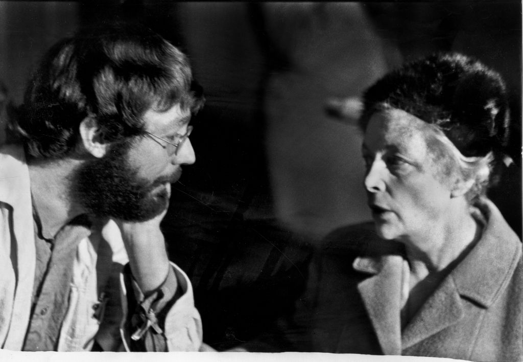 2001_03_0275.4245 Ludwig Binder: Studentenrevolte 1967/68, West-Berlin; veröffentlicht vom Haus der Geschichte